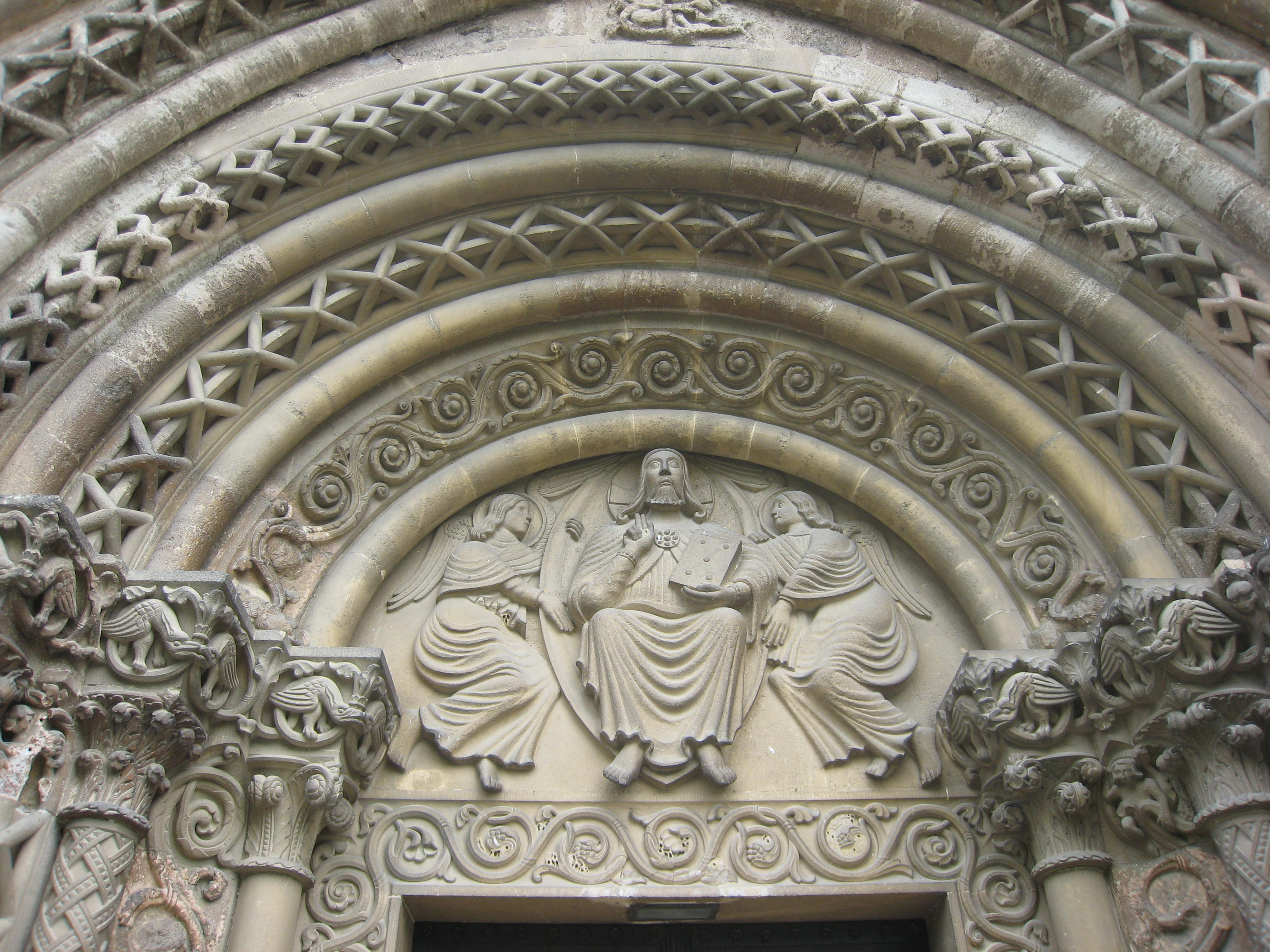 Cerkev sv. Jurija, Ják, Madžarska; timpanon nad glavnim vhodom.